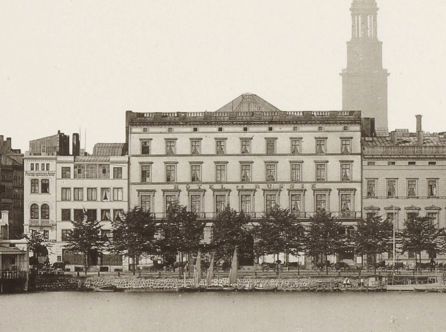 Hotel Russie und Glaskuppel (Oktogon) von Sillem's Bazar, Jungfernsteig 16. Bildausschnitt aus “Der alte Jungfernstieg”. Inhalt einer Bildmappe “Hamburg” mit 32 Photodrucken.